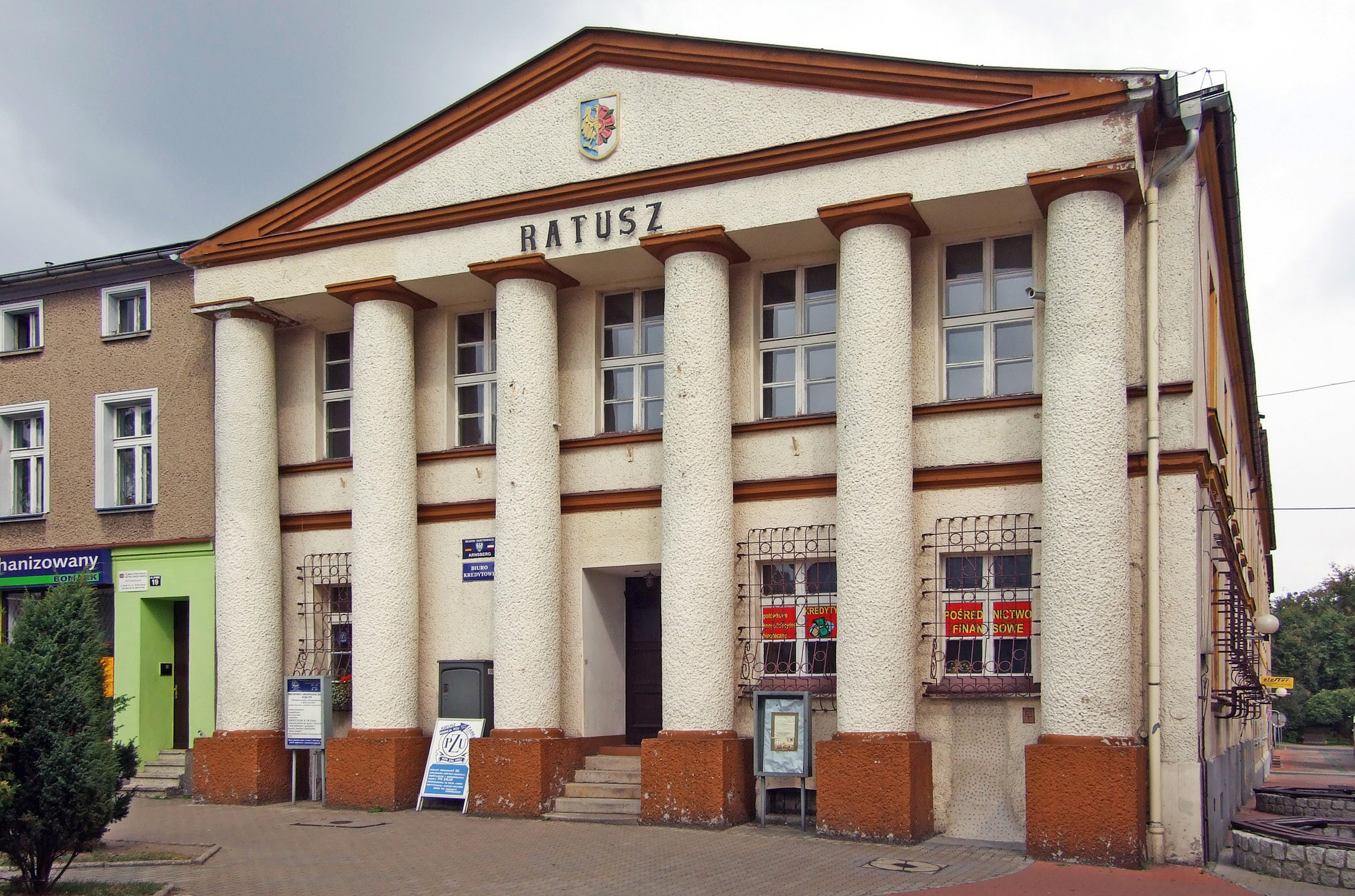 Rathaus in Olesno